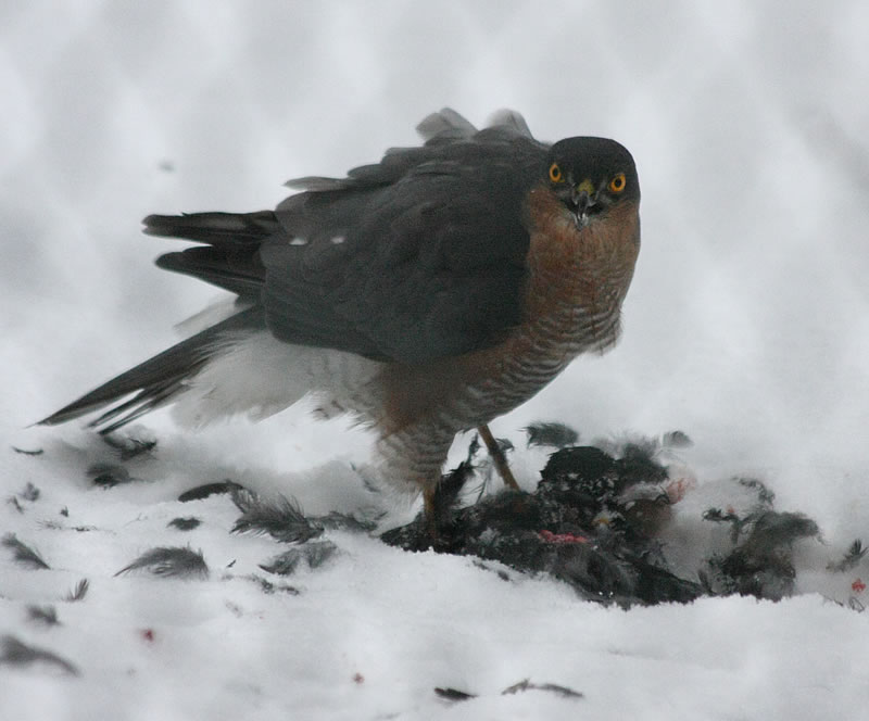 Dieses Bild zeigt ein adultes Sperber Accipiter nisus männchen mit einer gerade geschlagenen Amsel im Winter.